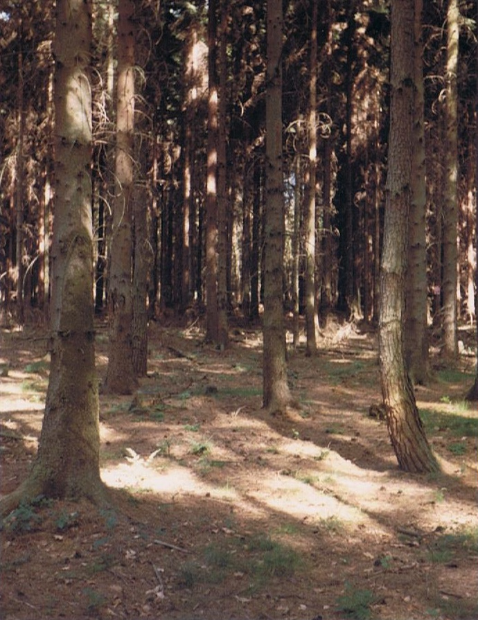 Fichten